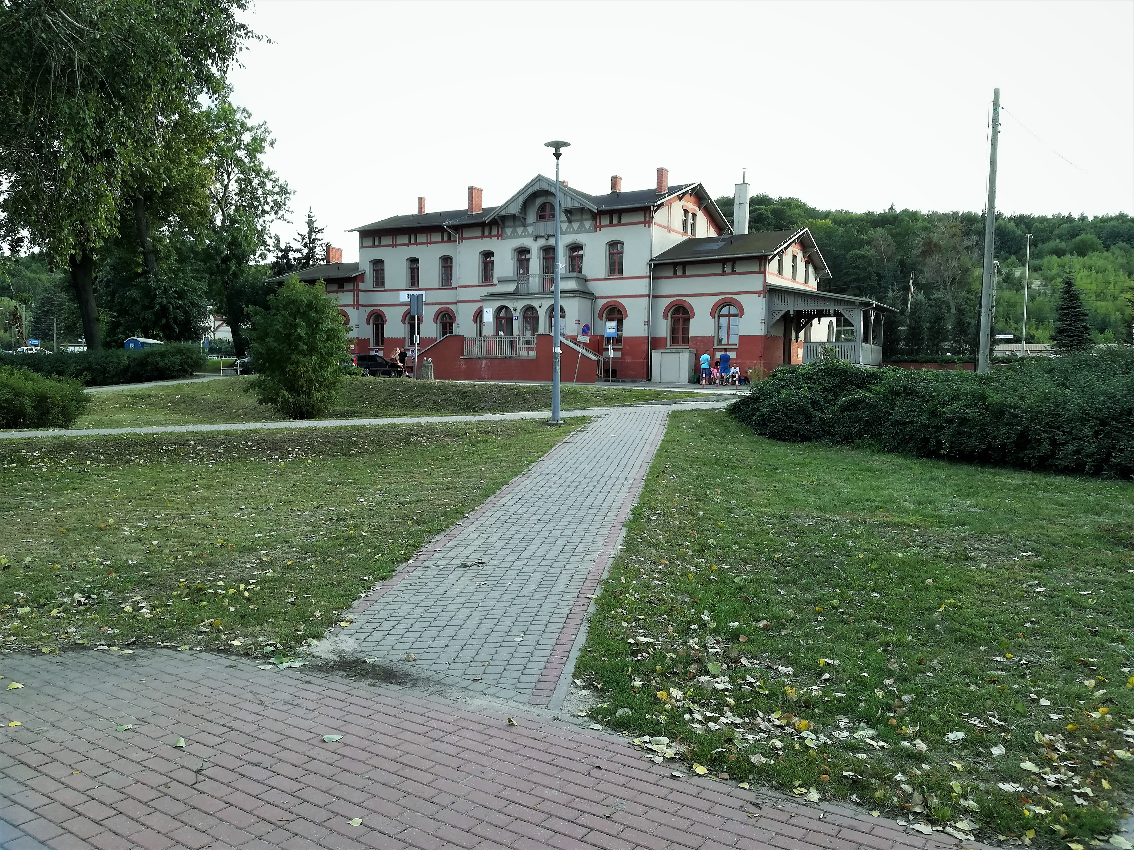 Dworzec kol. w Redzie.